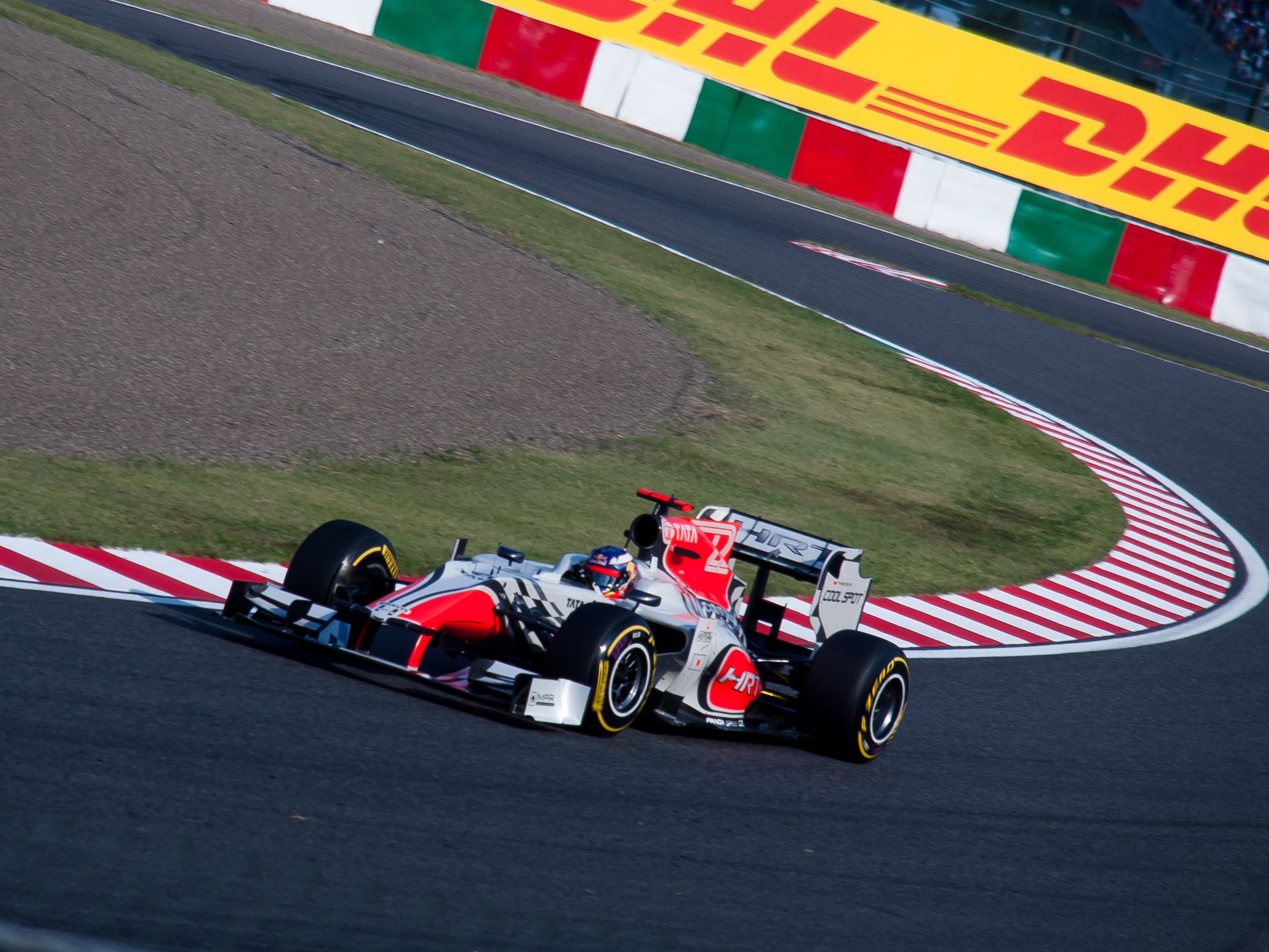 Даниэль Риккардо (HRT) на Гран-при Японии 2011 года